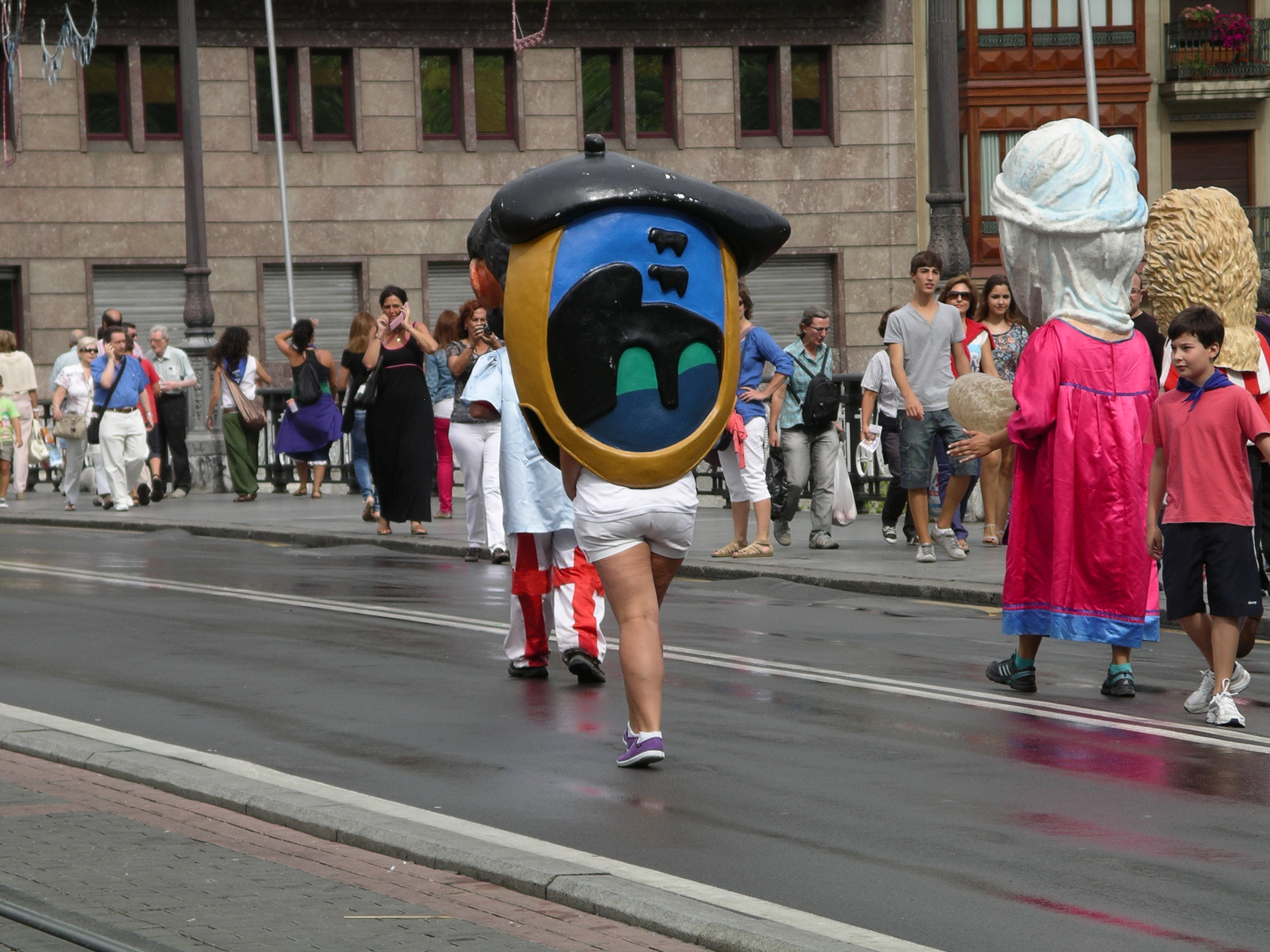 Desfile de gigantes y cabezudos en la Aste Nagusia de Bilbao. La imagen de este cabezudo fue ideada por el pintor e ilustrador Juan Carlos Eguillor Uribarri. Puente de El Arenal, Bilbao (Vizcaya).